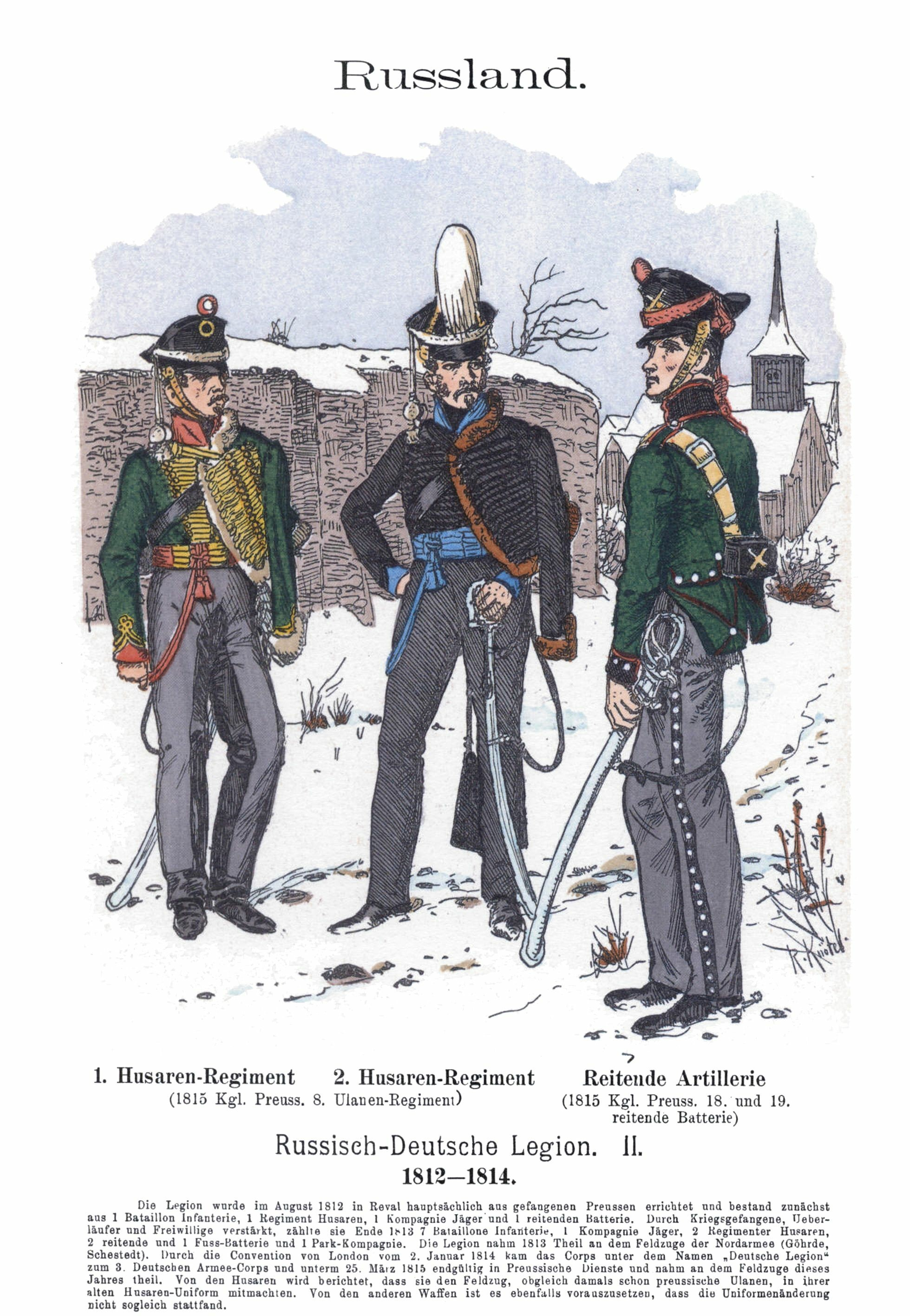 Русско-немецкий легион 1812-1814 - 1. Гусарский полк - 2. Гусарский полк - Конная артиллерия.